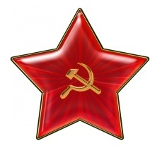 Hoheitsabzeichen der Streitkräfte der UdSSR, hier eine Varianten aus Metall des fünfzackigen Sowjetsterns, der an der Kopfbedeckung der Angehörigen der Roten Arbeiterund Bauernarmee (RA) und der Sowjetarmee (CA) seit den zwanziger Jahren des vorigen Jahrhunderts getragen wurde.